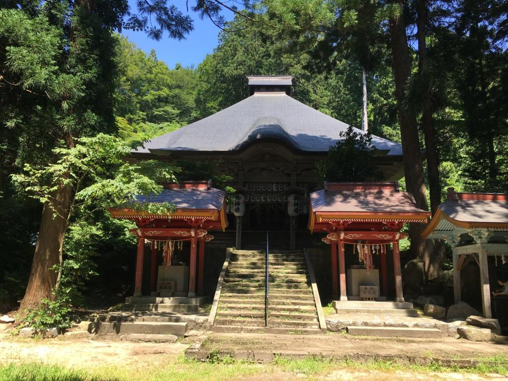 金峯神社（鶴岡市）拝殿